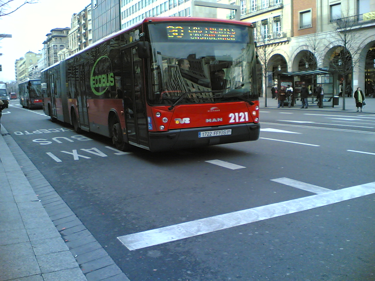 Autobus Ecologico (MAN NG313) de TUZSA (Zaragoza, Aragón).